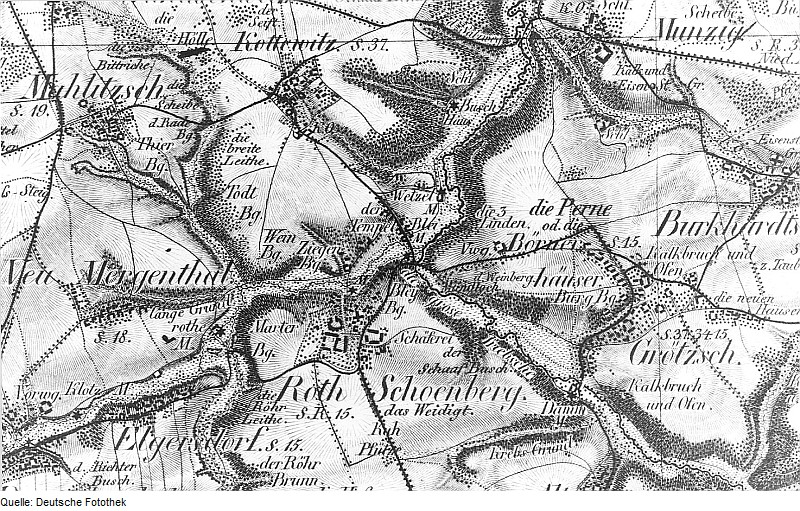 Original image description from the Deutsche Fotothek Triebischtal-Rothschönberg. Ausschnitt aus: Oberreit, Sect. Freiberg, vor 1843